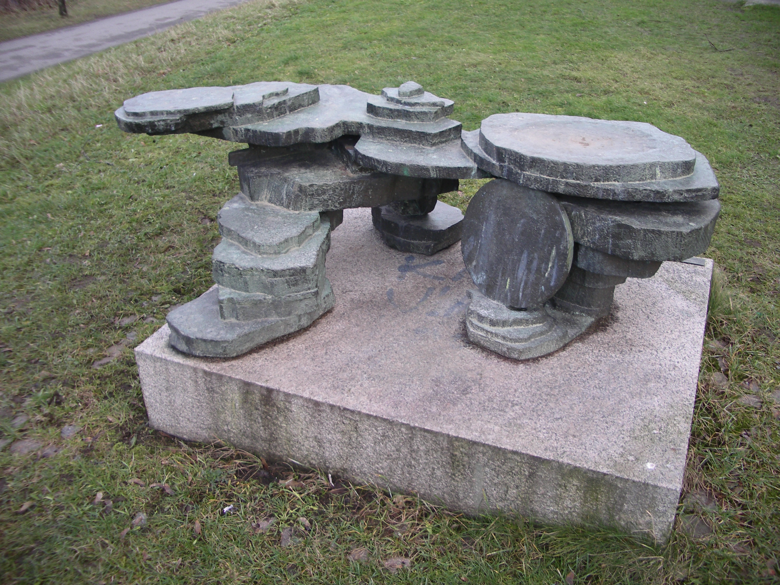 Willy Gordon´s Protoorganism (1966), Bredäng, Stockholm